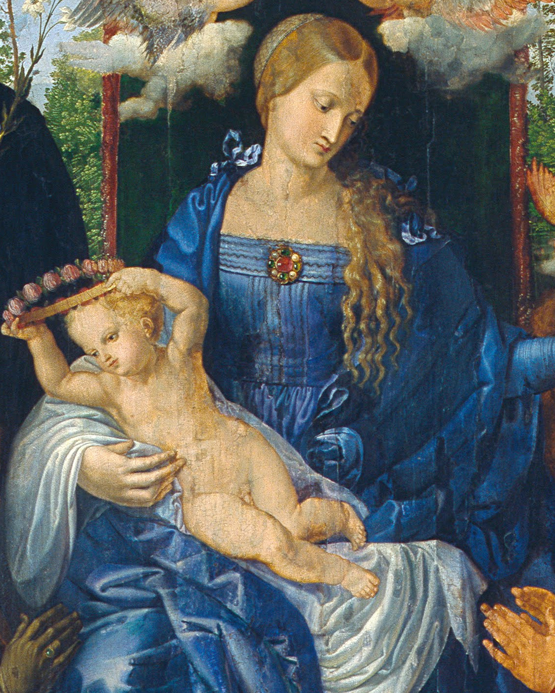 Madonna und Kind aus Dürers Rosenkranzfest.